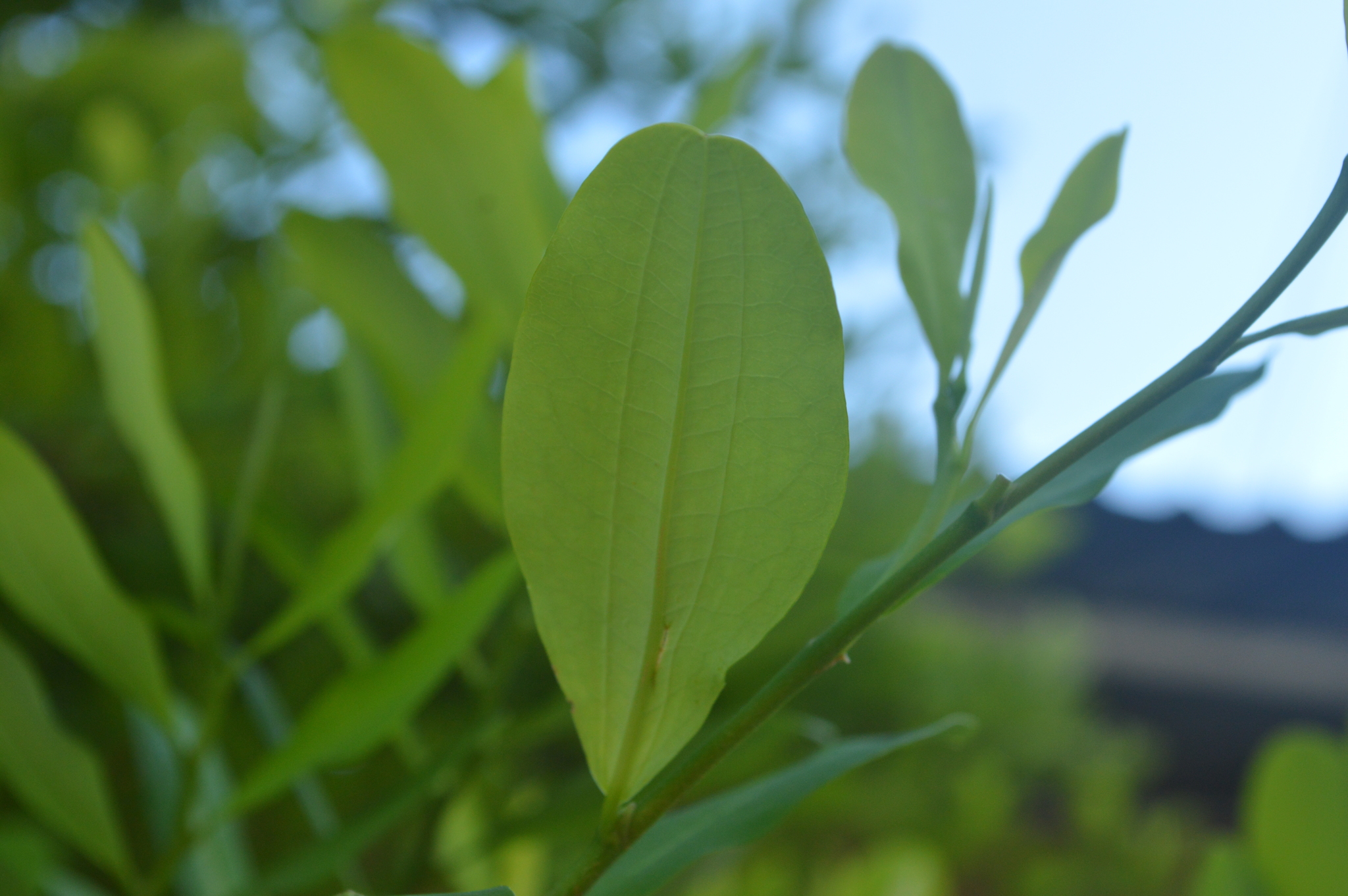 Hojas de coca (Erythroxylum coca) en Villavicencio, Meta, Colombia. Foto tomada el 2 de agosto de 2018.